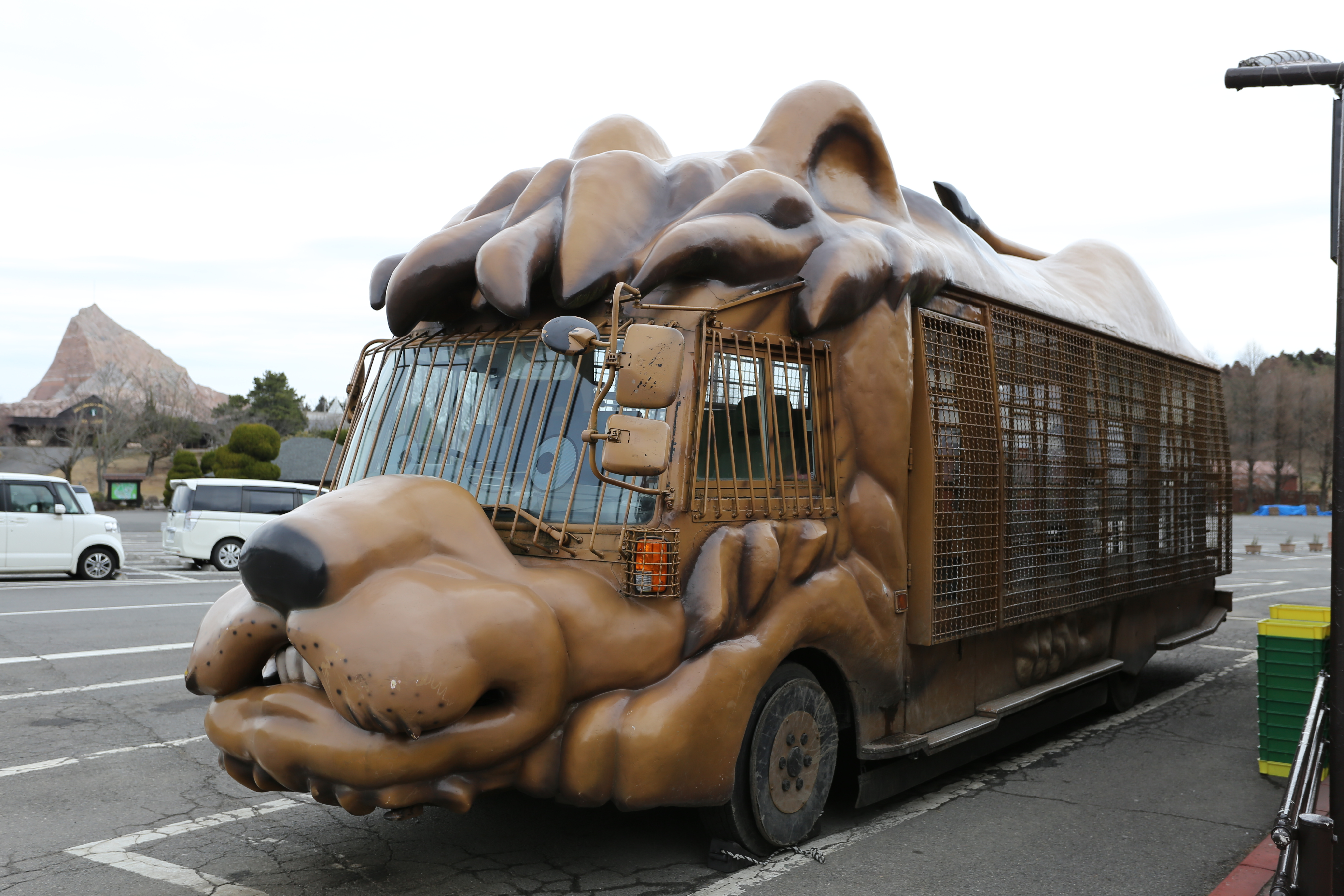 アフリカンサファリ African Safari 九州自然動物園